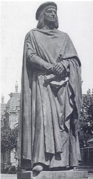 Escultura de l'escriptor medieval Bernat Desclot (segona meitat del segle XIII), obra de Manuel Fuxà de 1888. Va ser destruïda el 1937, estava ubicada a l'actual passeig Lluís Companys de Barcelona.